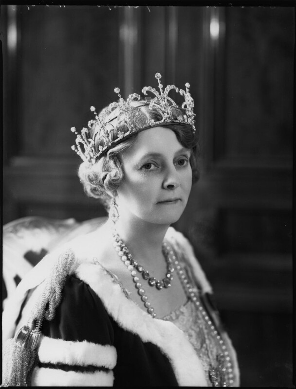 La comtesse d'Iveagh, 11 mai 1937